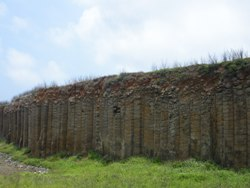 中文（台灣）: 澎湖縣西嶼大菓葉柱狀玄武岩。